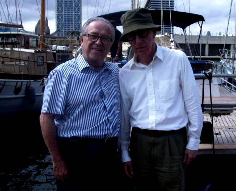 El actor de doblaje Arsenio Corsellas, con el cineasta Woody Allen.